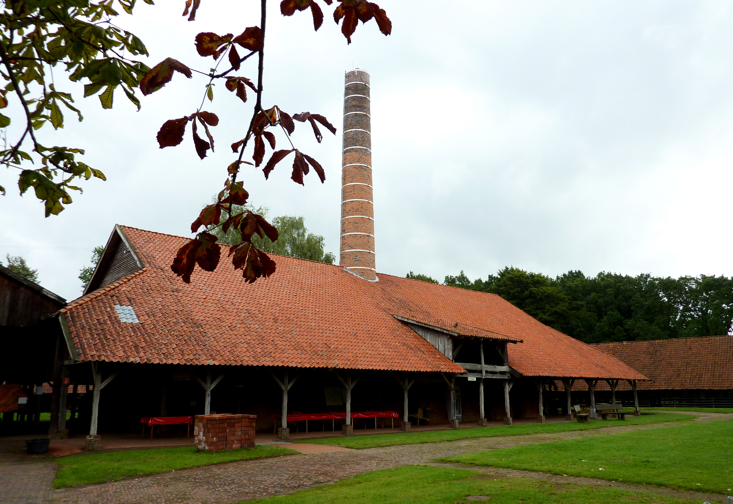 Ziegelei der Familie Pape in Bevern (Bremervörde). Aktiv von 1840 bis 1973. Anlage unter Denkmalschutz seit 1976. Von Mai bis September ist die gesamte Anlage jeden Sonntag von 14 bis 17 Uhr geöffnet.